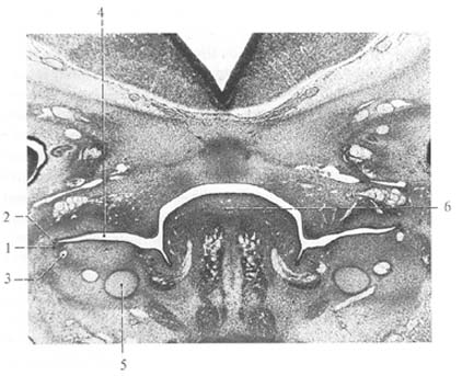 Entwicklungsbeginn des Juxtaoralen Organs beim menschlichen Embryo, W. Zenker